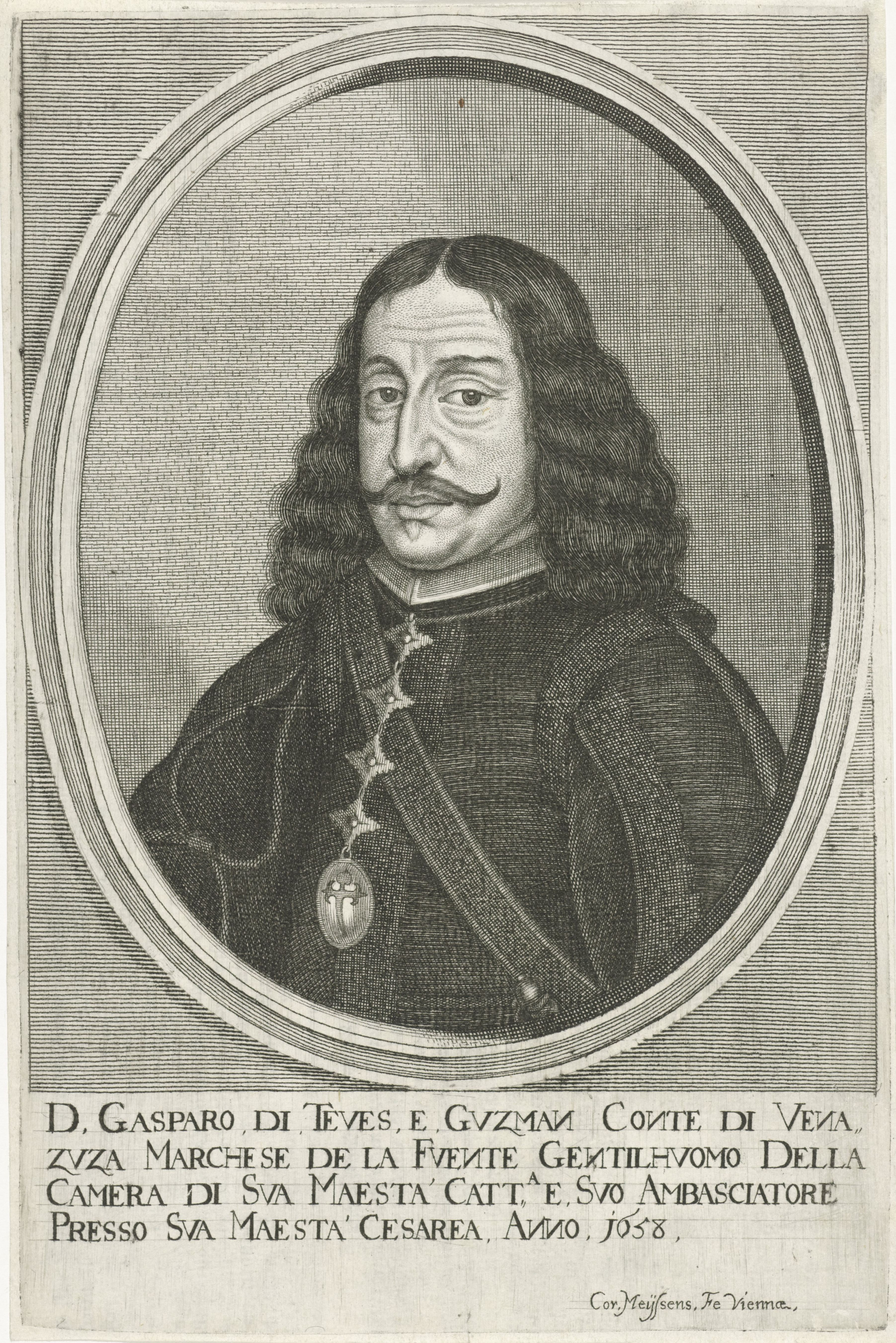 IdentificatieTitel(s): Portret van Don Gaspar de Tebes y Tello de GuzmánObjecttype: prent boekillustratie Objectnummer: RP-P-1905-1206Opschriften / Merken: verzamelaarsmerk, verso, gestempeld: Lugt 2228Omschrijving: Portret van Don Gaspar de Tebes y Tello de Guzmán, eerste graaf van Benazuza. Onderaan in demarge zijn titel en functie in het Italiaans.VervaardigingVervaardiger: prentmaker: Cornelis Meyssens (vermeld op object)uitgever: Giovanni Battista HacquePlaats vervaardiging: WenenDatering: 1670Fysieke kenmerken: gravureMateriaal: papier Techniek: graveren (drukprocedé)Afmetingen: plaatrand: h 240 mm × b 156 mmToelichtingPrent gebruikt in: Gualdo Priorato, Galeazzo. Historia di Leopoldo Cesare, (...). 3 dln. Wenen, Giovanni Battista Hacque, 1670-1674, dl. 1.OnderwerpWie: Don Gaspar de Tebes y Tello de GuzmánVerwerving en rechtenVerwerving: aankoop 1905Copyright: Publiek domein